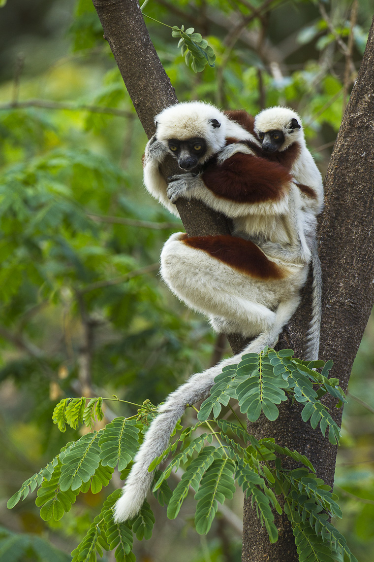 Coquerel's Sifaka - Ankarafantsika - Madagascar_S4E9140